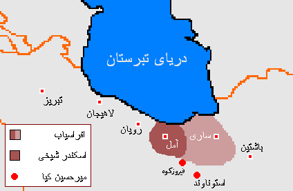 مازِرونی: چلاویون نخشه